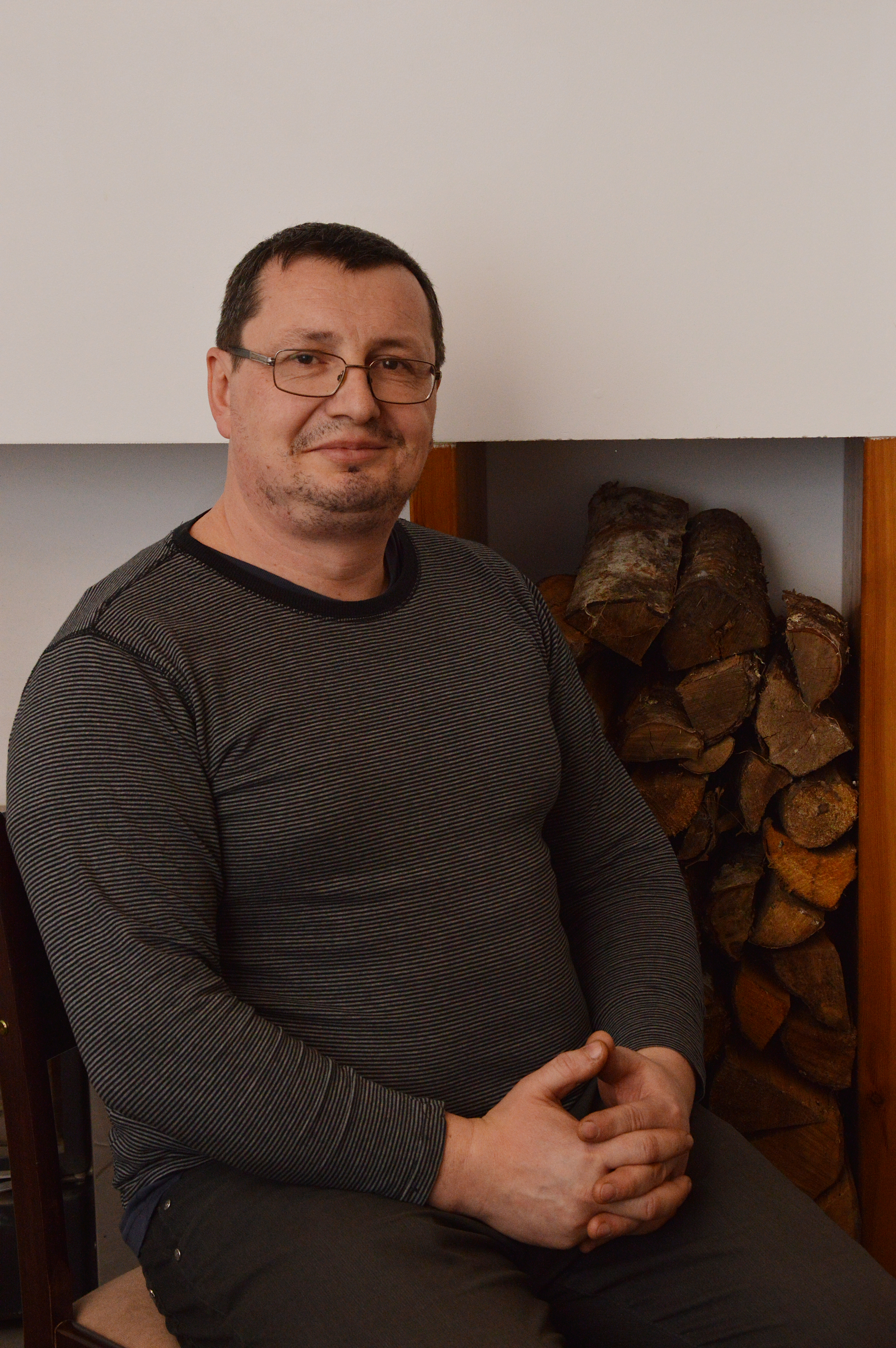 Jan Rahman IV soome-ugri Vikipeediate seminaril.